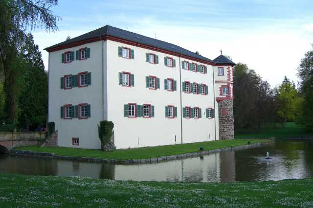 (Wasser-)Schloss Eichtersheim in Angelbachtal-Eichtersheim